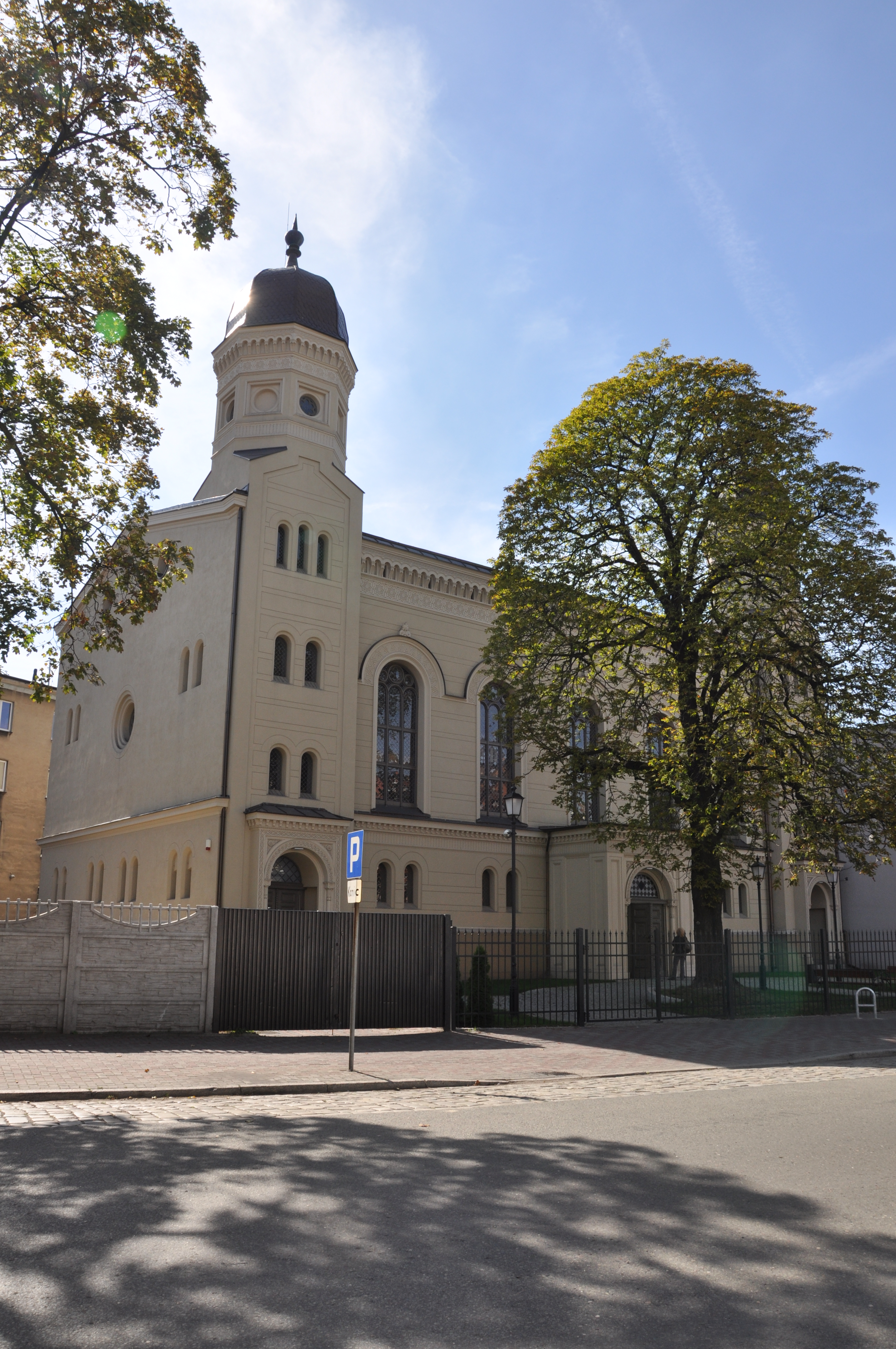 Ostrów Wielkopolski, ul. Raszkowska - synagoga z lat 1857-1860 (zabytek nr 434/A)